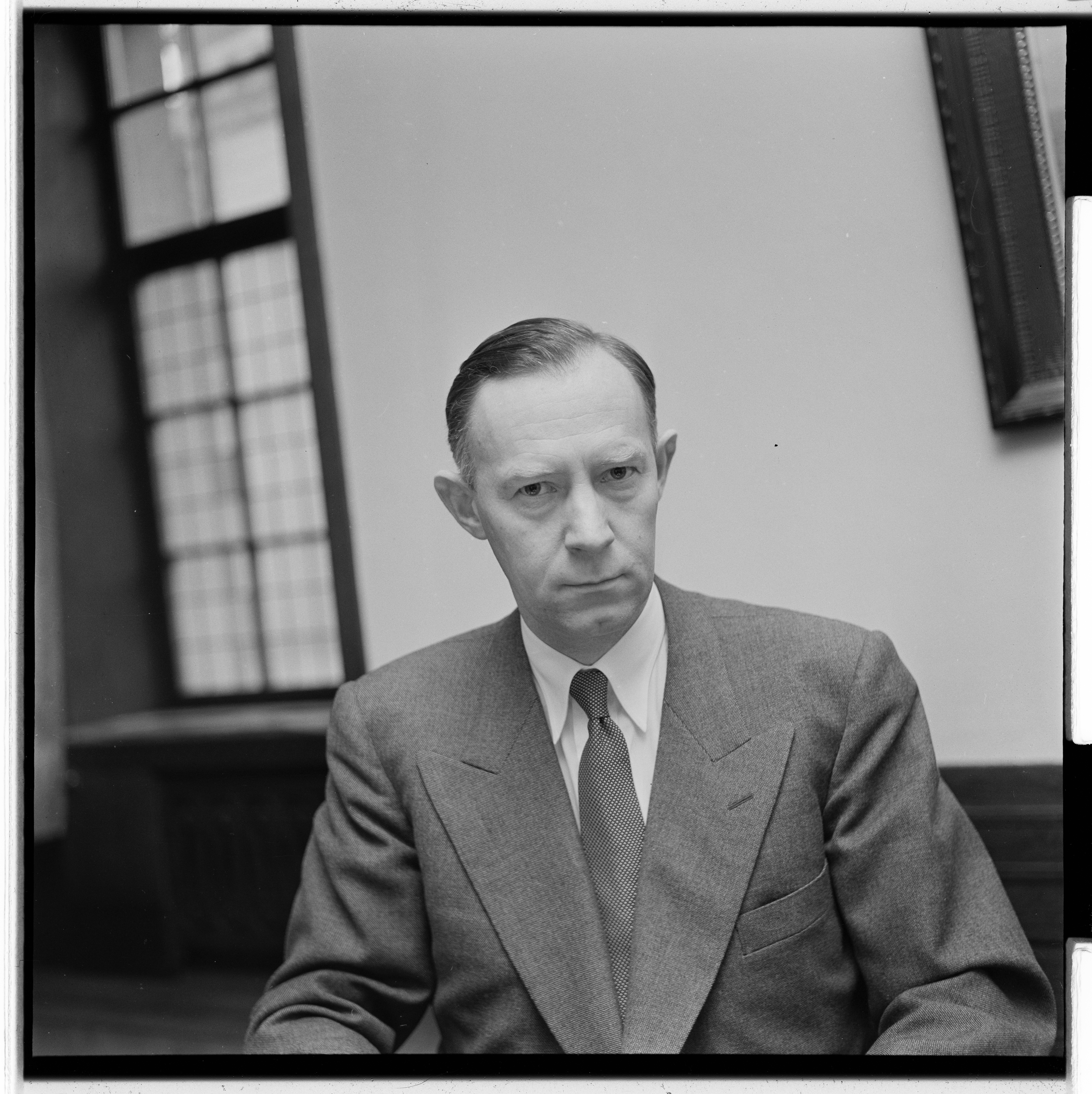 Bildet er hentet fra Arkivverket. Johan Melander, banksjef i Den norske Creditbank. NÅ nr. 3, 1954 Arkivinstitusjon : Riksarkivet Arkivnavn : Billedbladet NÅ Sted : Norge, Ukjent, Ukjent, Den norske Creditbank Emneord: Menn, Portretter Avbildet: Melander, Johan